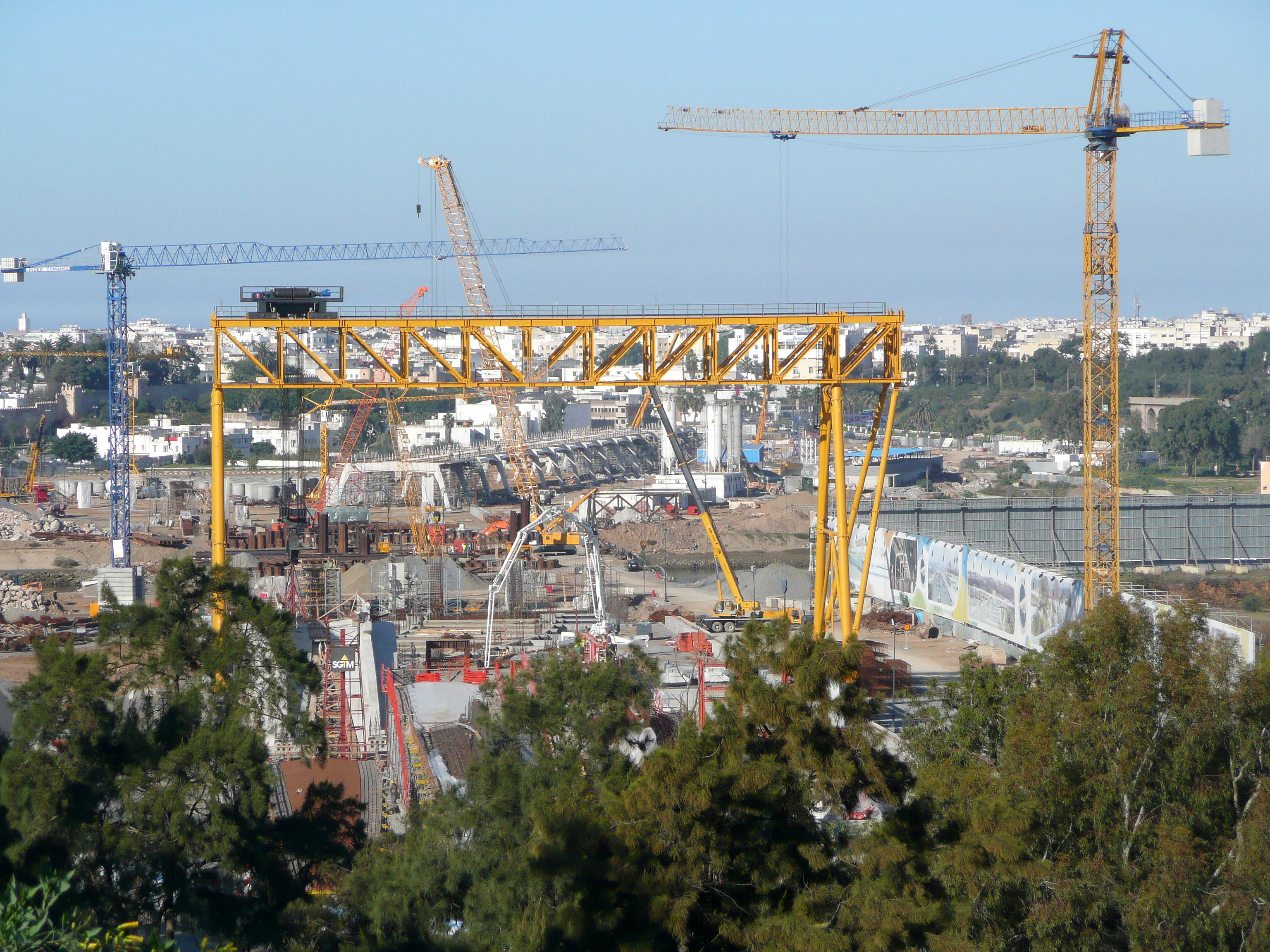 Le chantier de Tramway de Rabat-Salé sur l'oued Bou Regreg